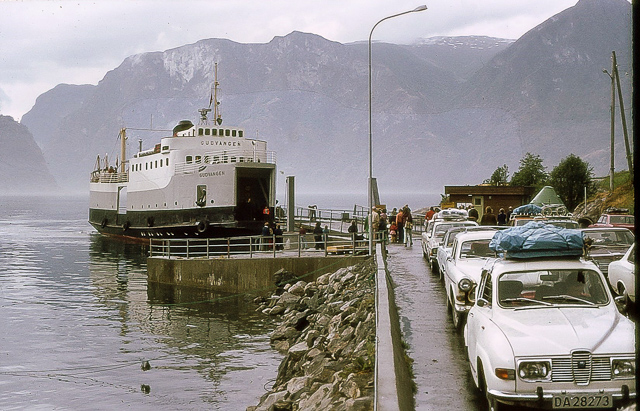 Aurland fergekai. MF Gudvangen i rute Flåm-Aurland-Gudvangen.